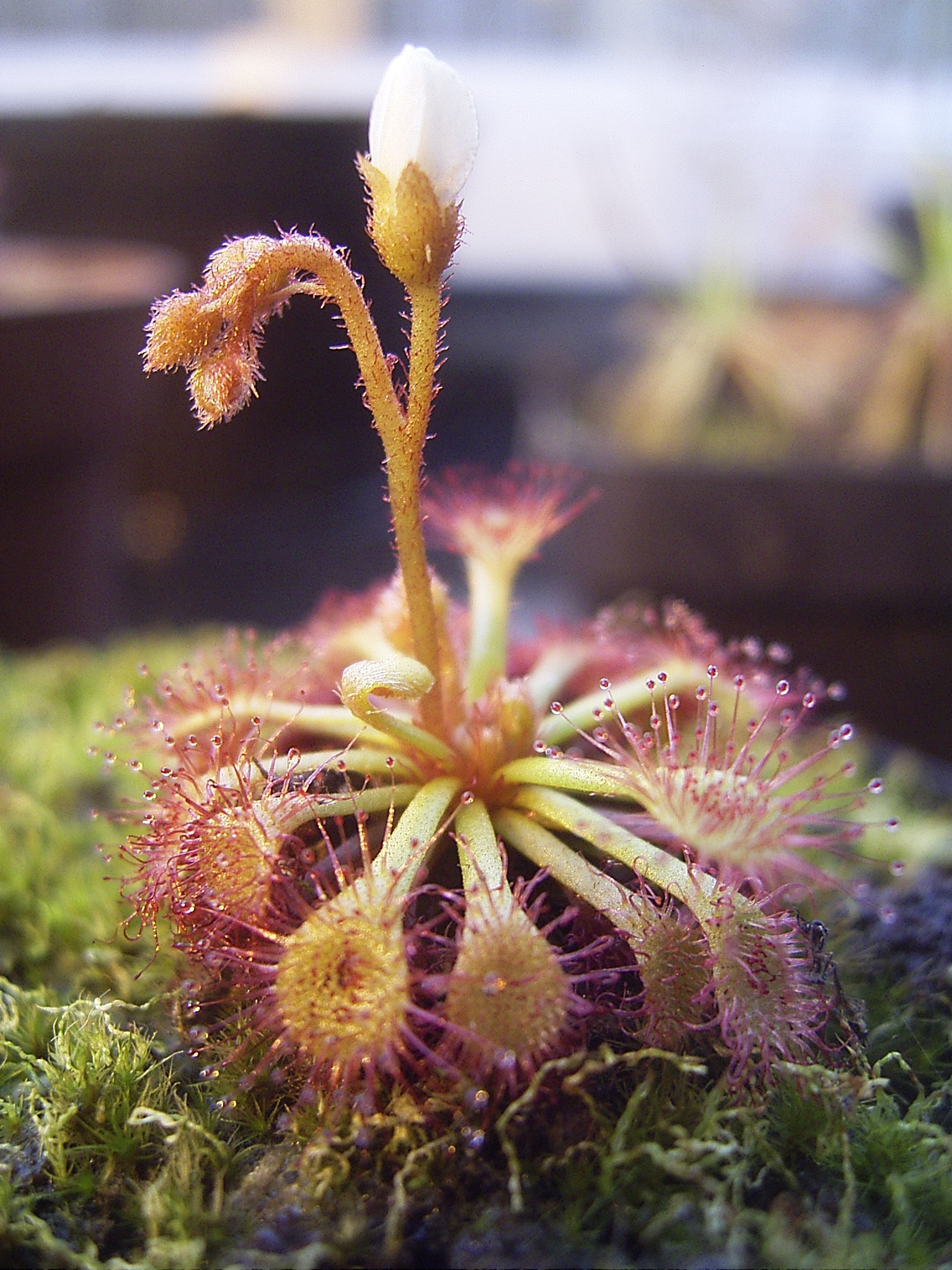 Drosera felix